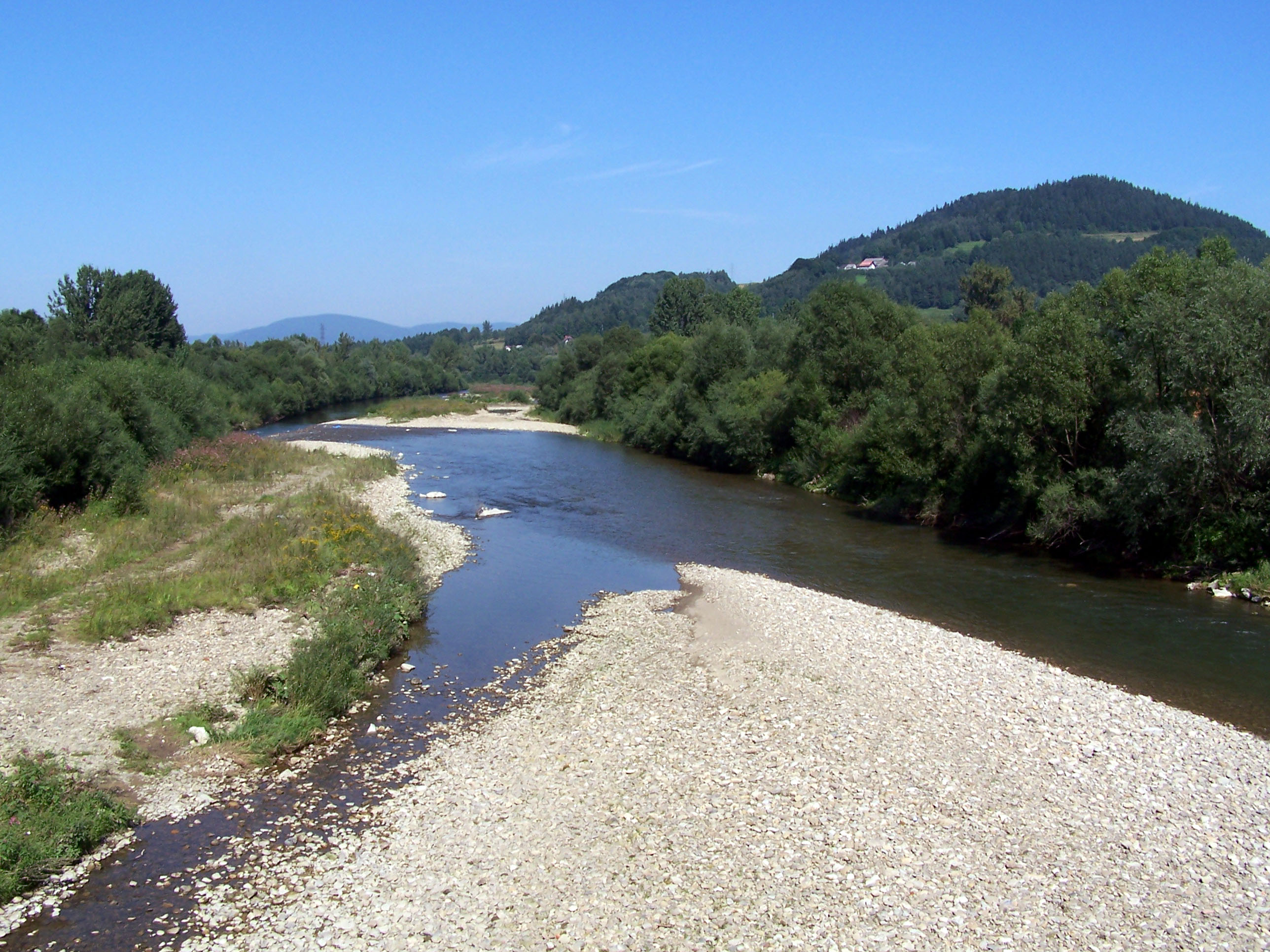 Soła River near Wieprz, Poland